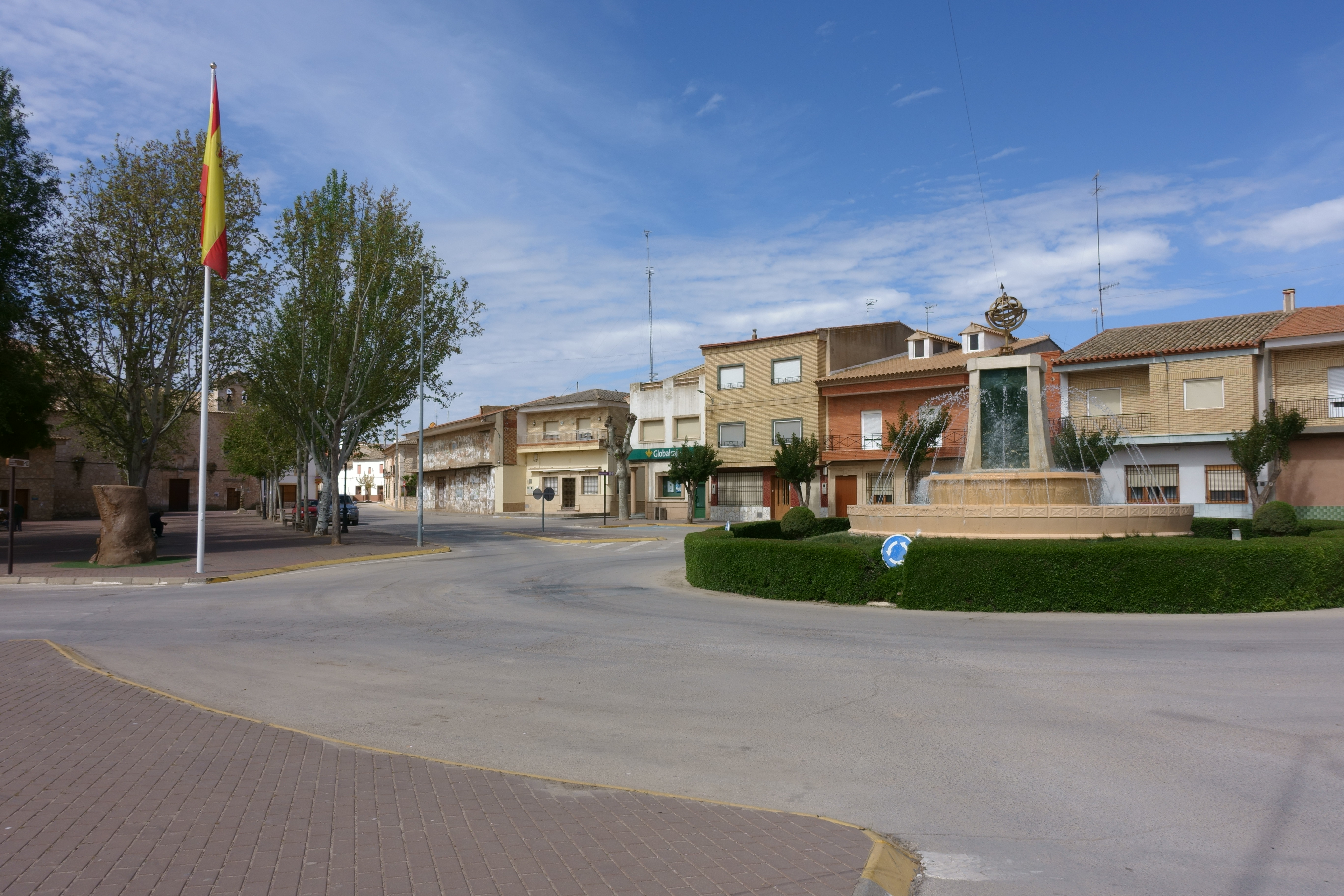 Plaza del Parador, en La Alberca de Záncara (Cuenca, España).